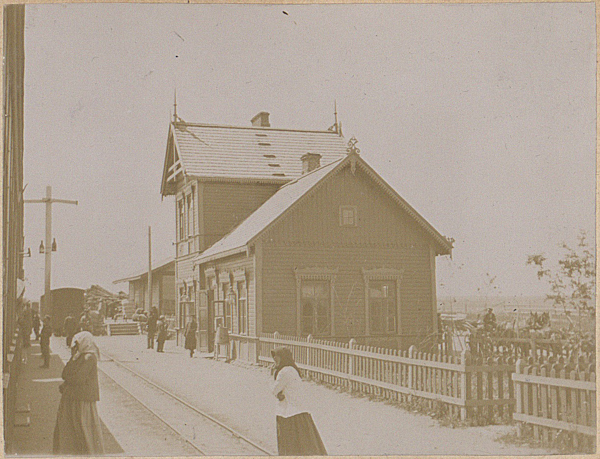 Беларуская (тарашкевіца): Лынтупы (Łyntupy). Чыгуначная станцыя